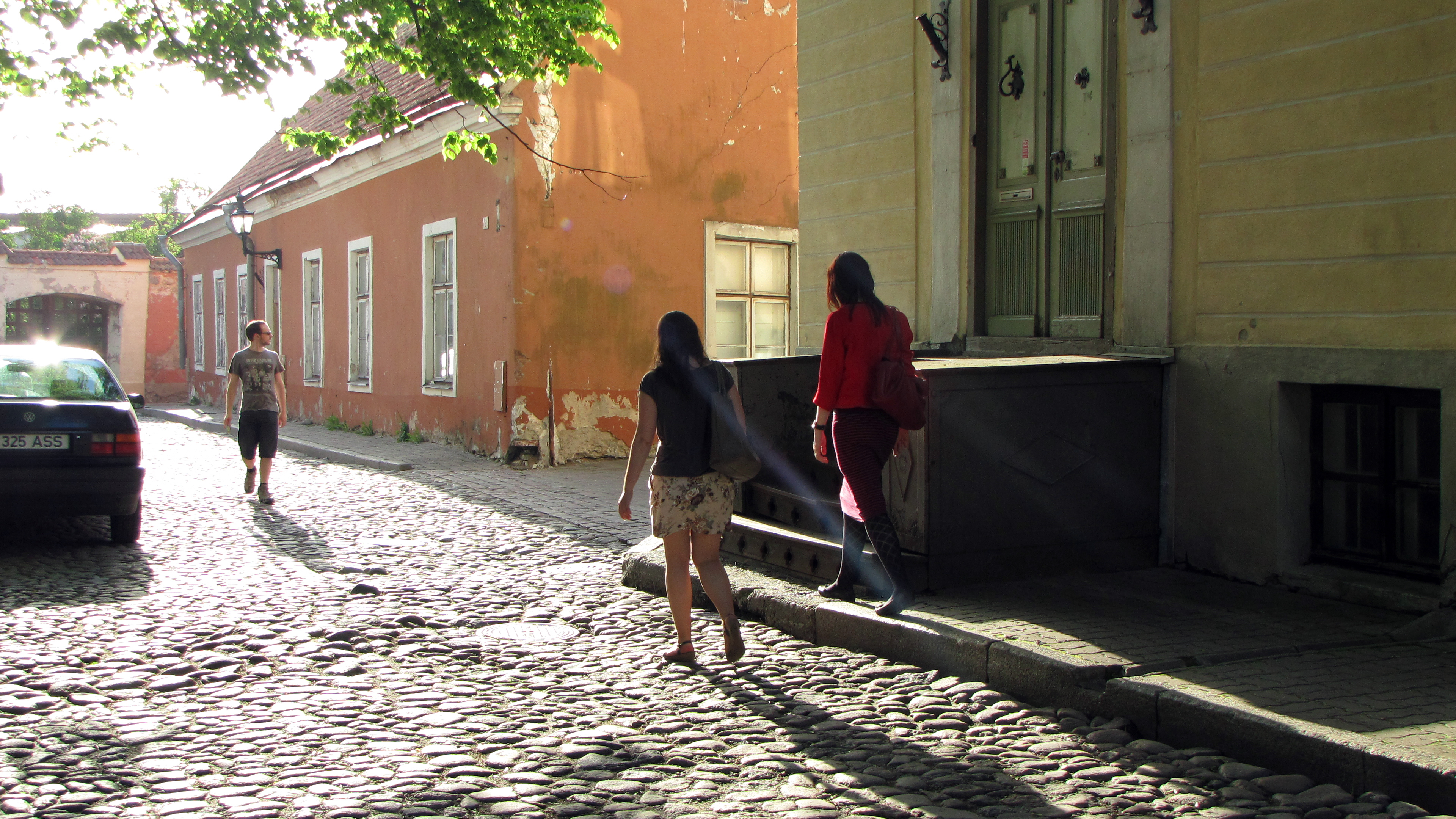 Kiriku tn. Tallinna vanalinn